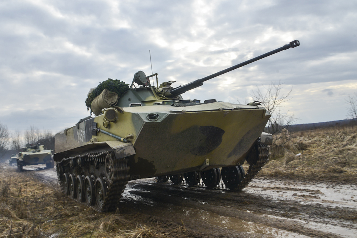 В Псковской области в ходе совместного российско-белорусского учения осуществлена высадка воздушного десанта.